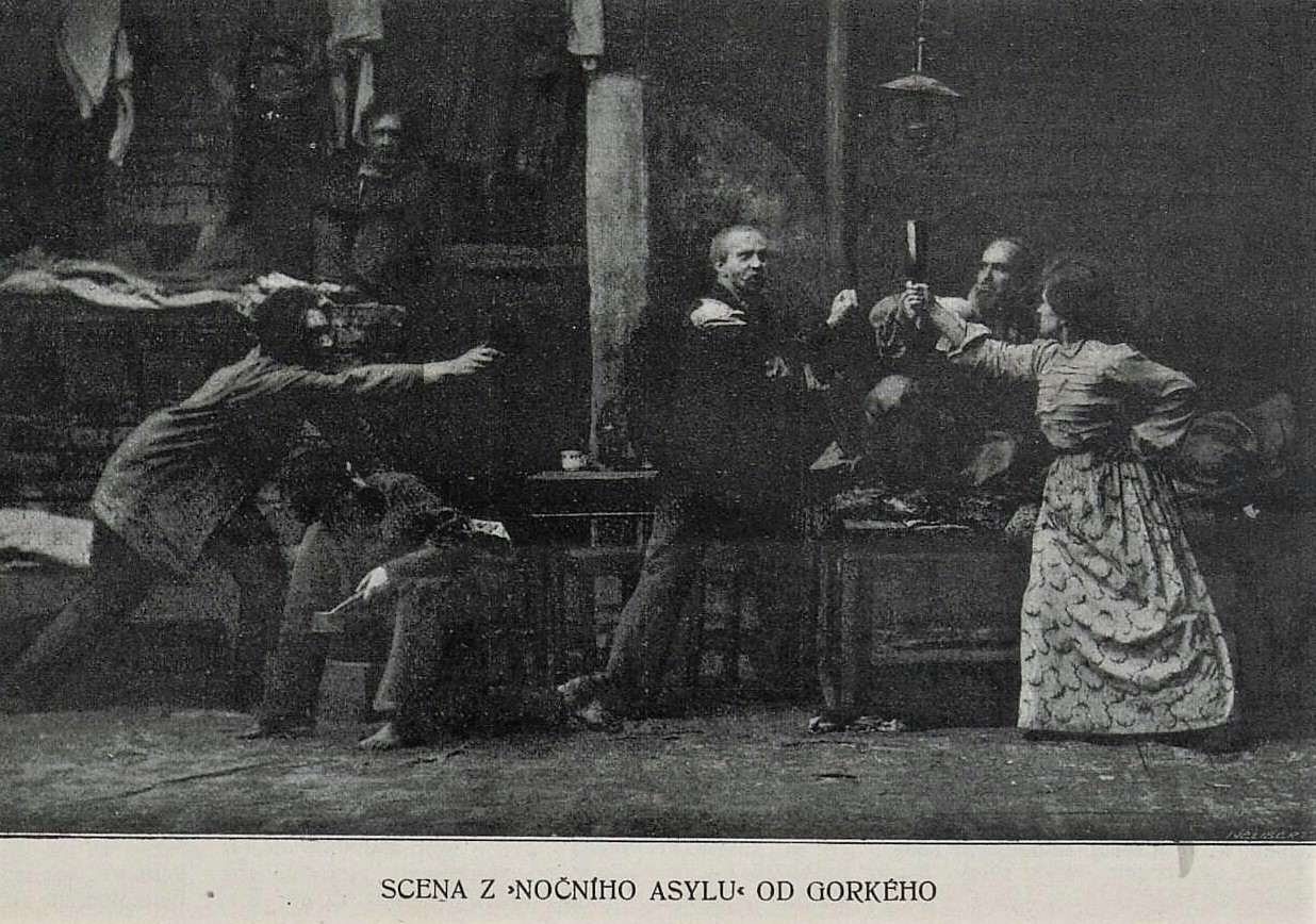 MCHAT, Praha 1905, Noční asyl